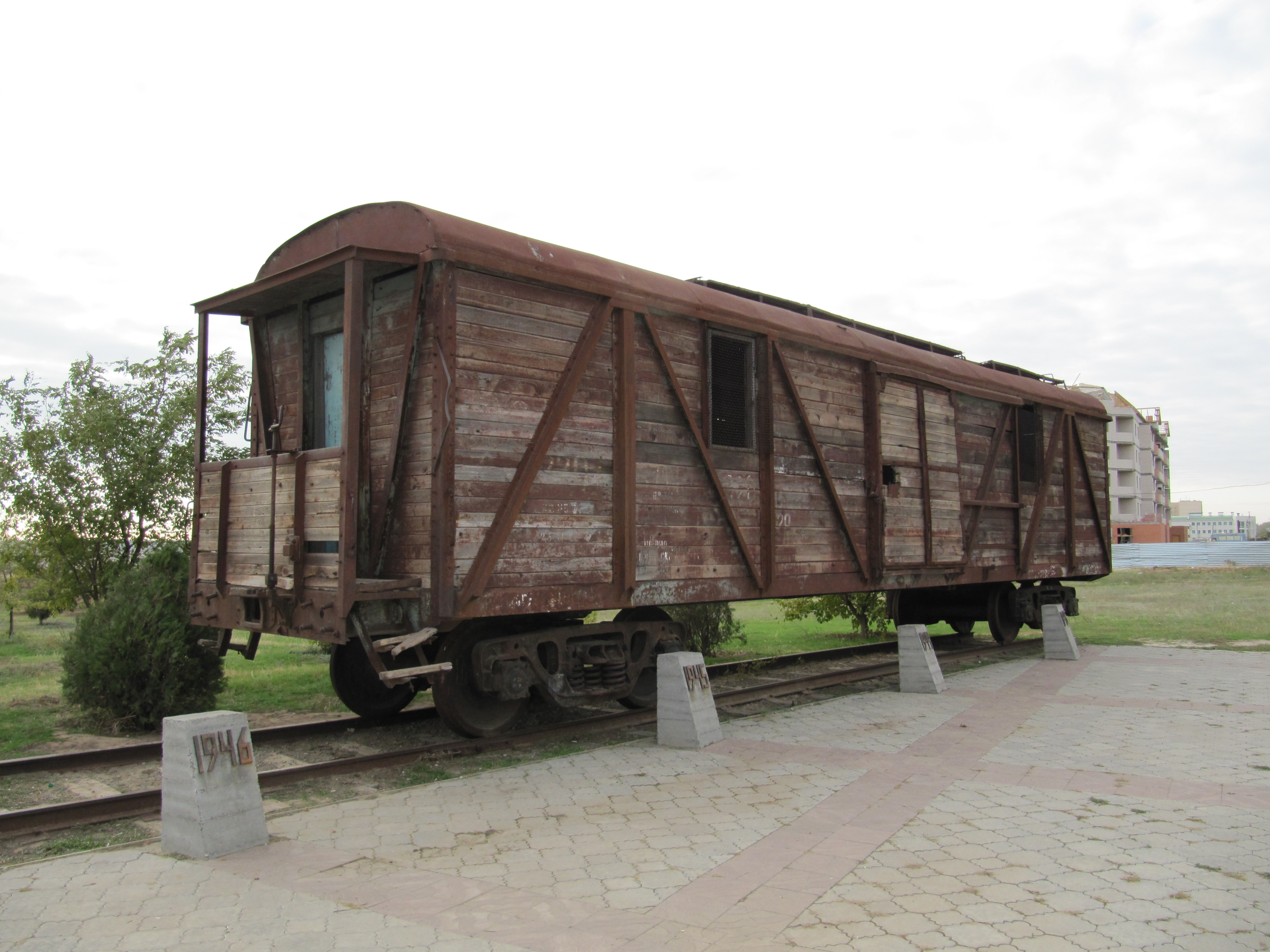 Фрагмент памятника "Исход и Возвращение", Элиста, Калмыкия